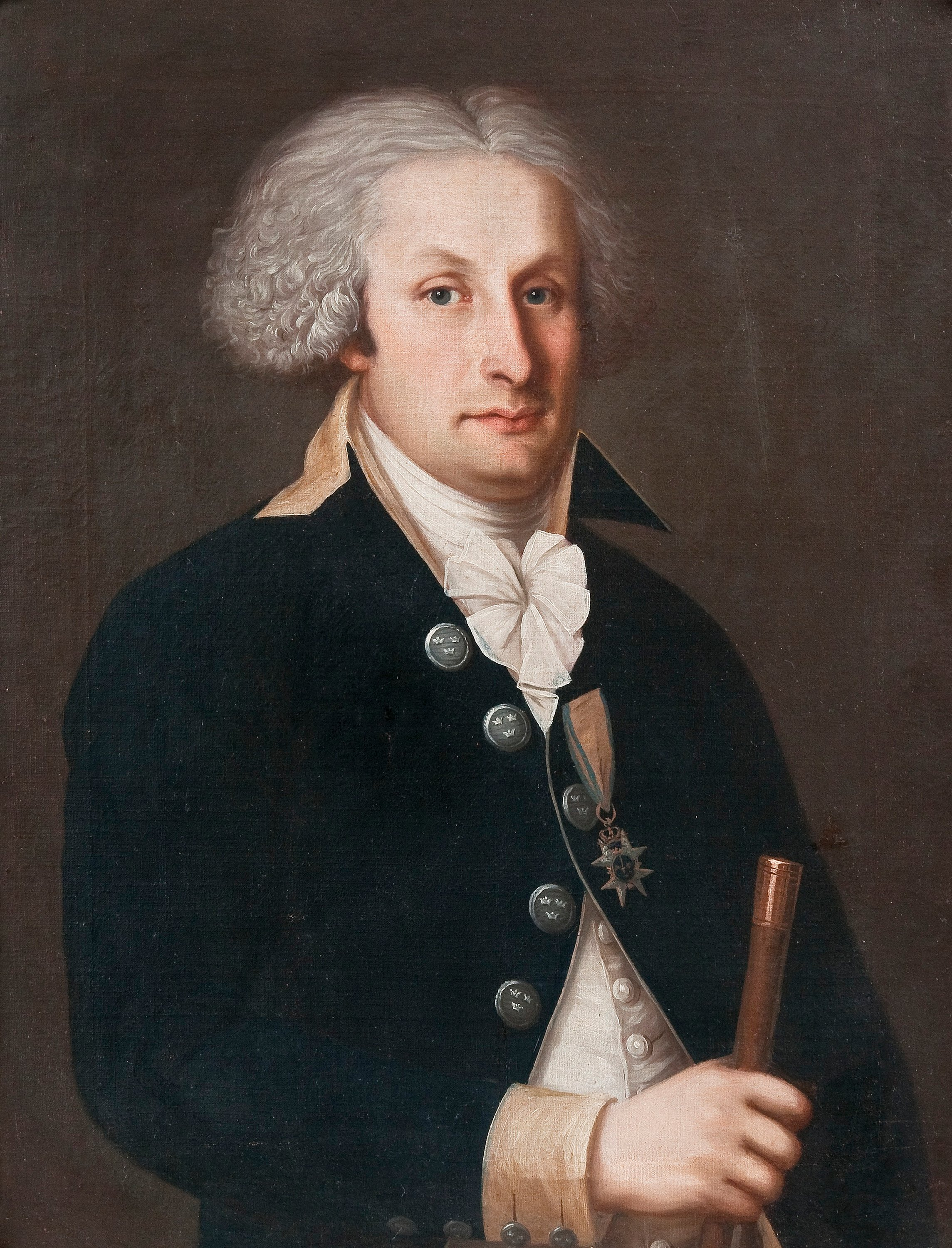 Fredrik Adolf Jägerhorn 1760-1817, colonel, governor